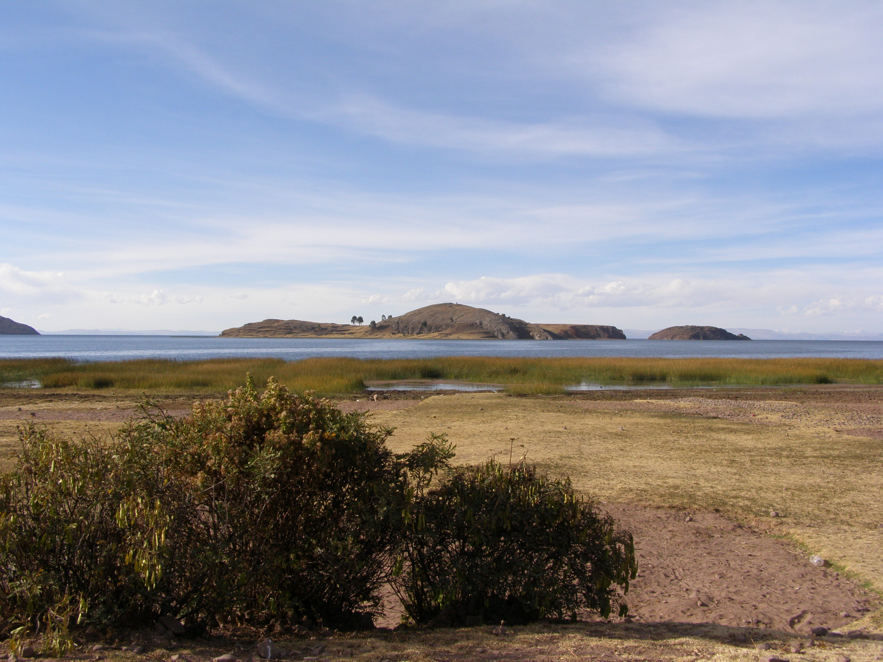 Het eiland Tikonata in het Titicacameer gezien vanaf Ccotos. Runa Simi: Tikunata wat'a, Qutusmanta rikusqa, Titiqaqa qucha